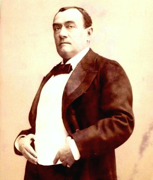 French singer Paulus (1845-1908)